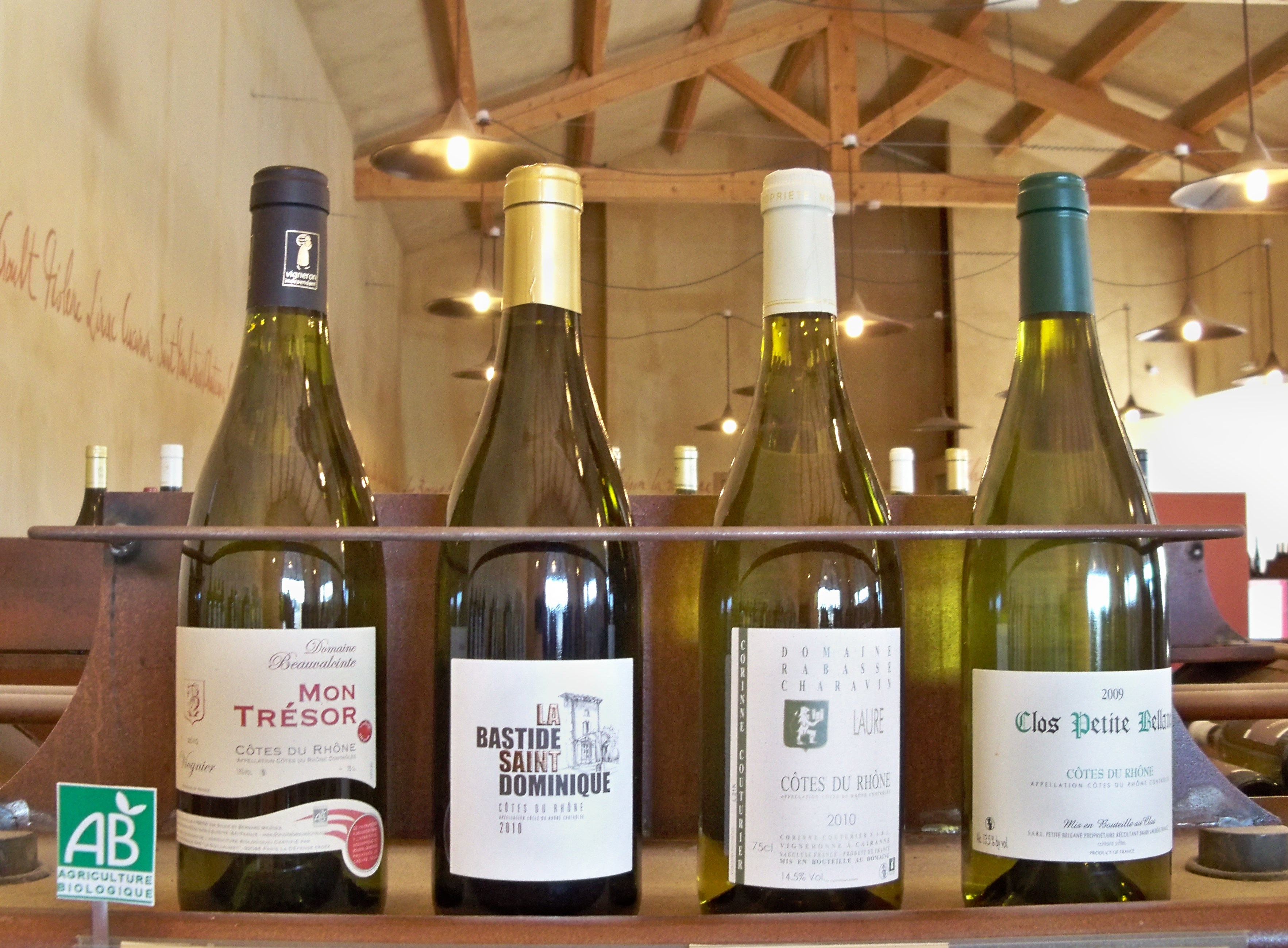 Côtes du Rhone AOC labellisé Bio